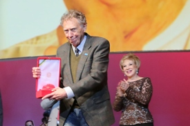 São Paulo (SP) | Ministério da Cultura celebra a Ordem do Mérito Cultural 2013. Na foto: José Antunes Filho. 05.11.2013 Foto: Elisabete Alves